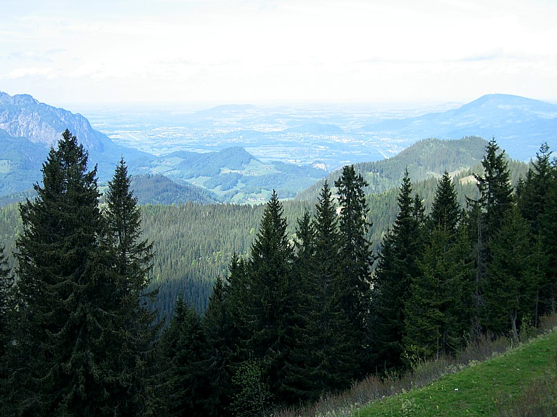 Rossfeldstrasse - Berchtesgaden - Bavaria - Germany